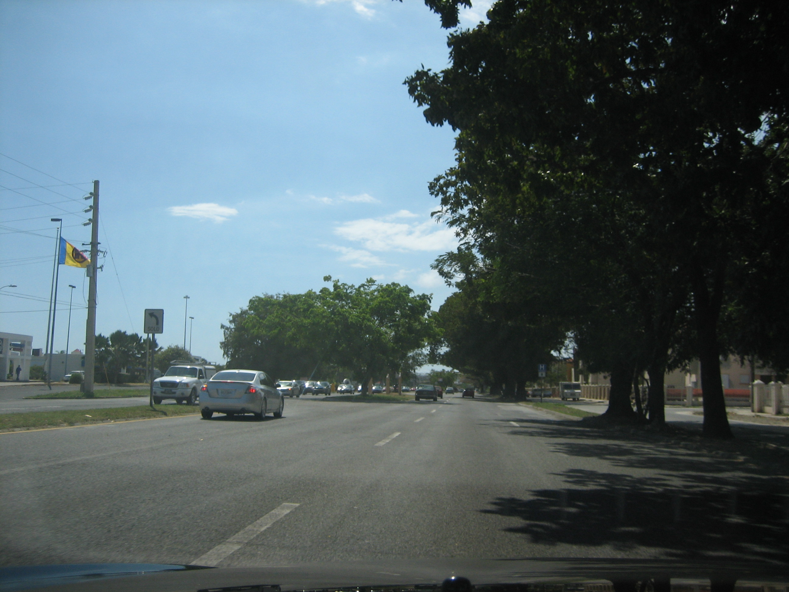 PR-2 Ponce